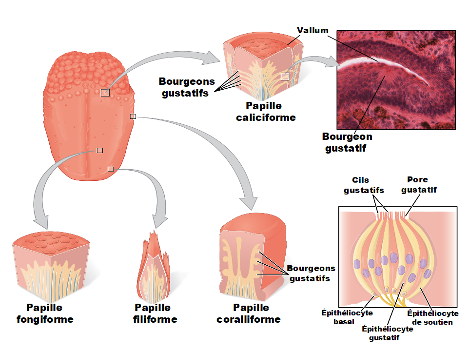 Anatomie (papilles) et histologie (bourgeons gustatifs) de la langue